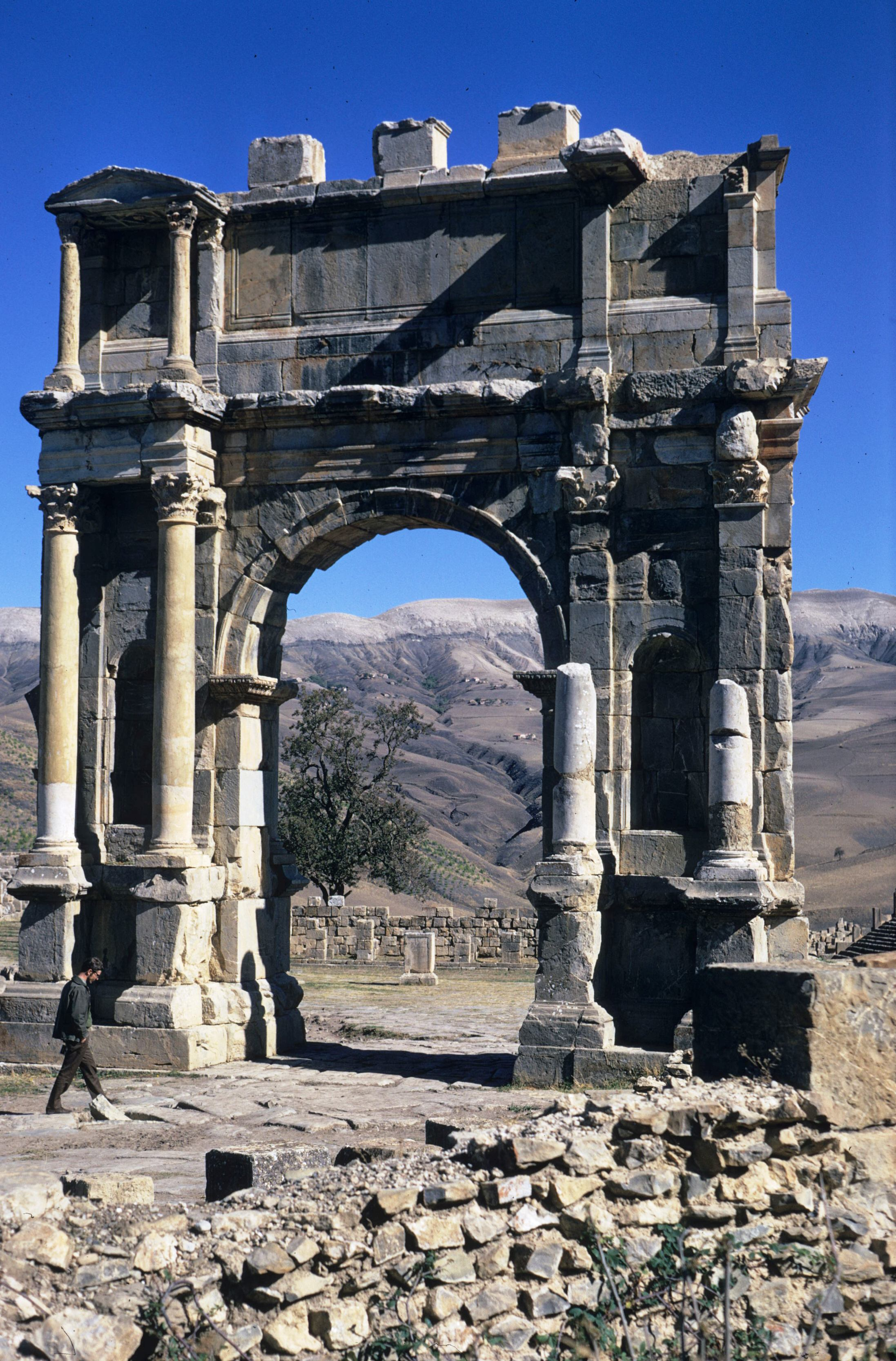 Djemila, Algeria, 1971